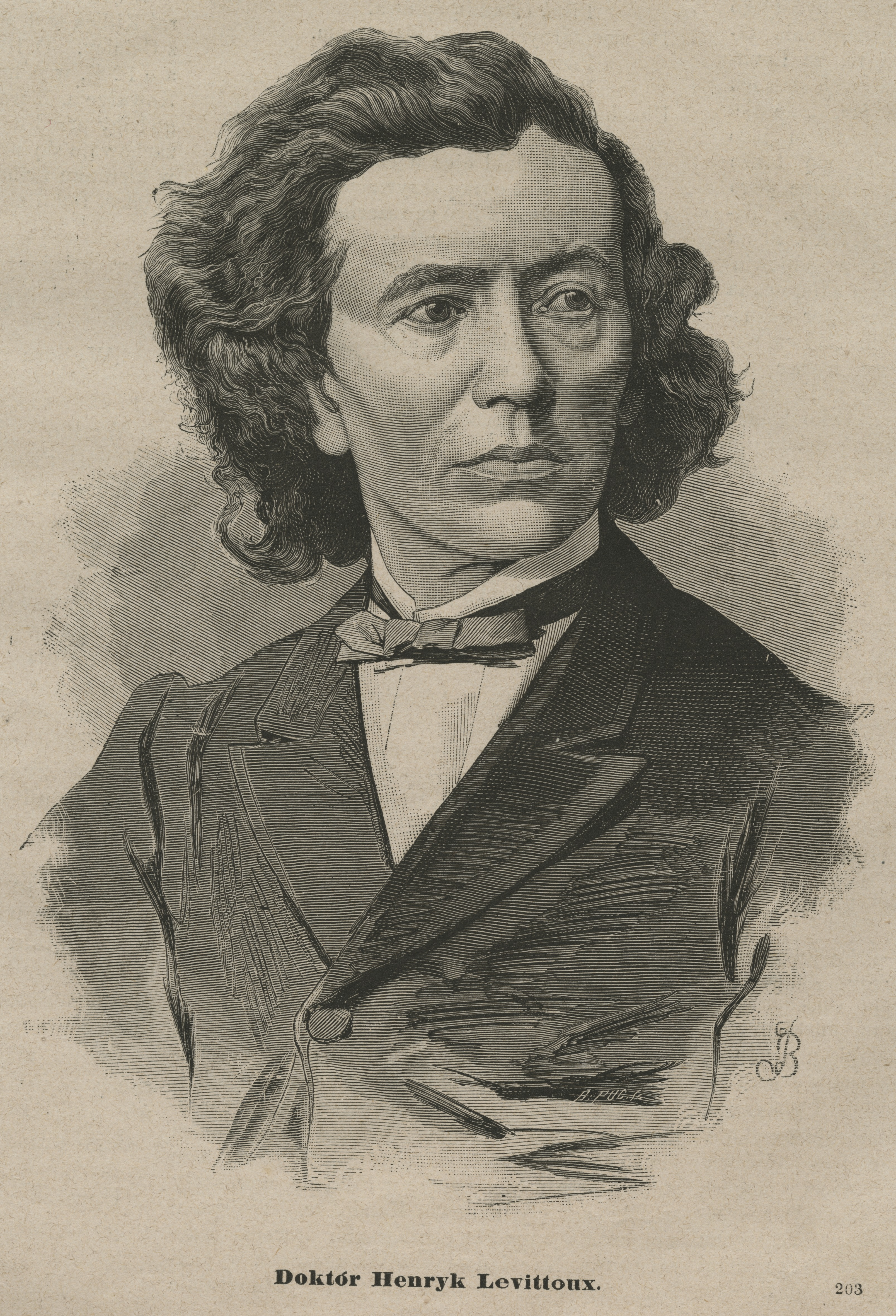 Doktór Henryk Levittoux